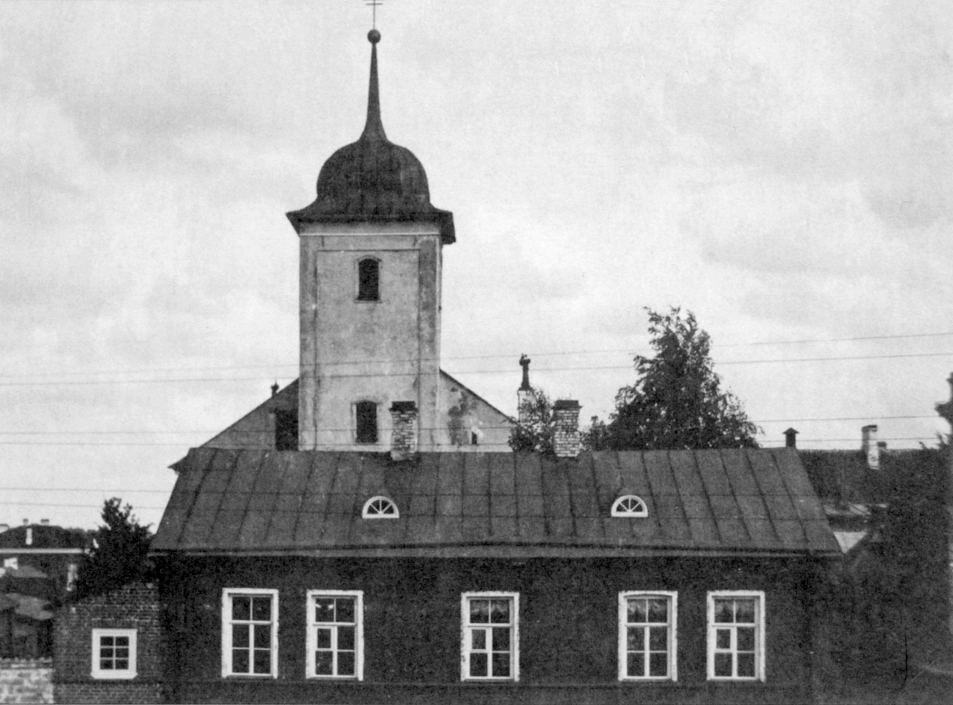 Narva Püha Miikaeli kirik